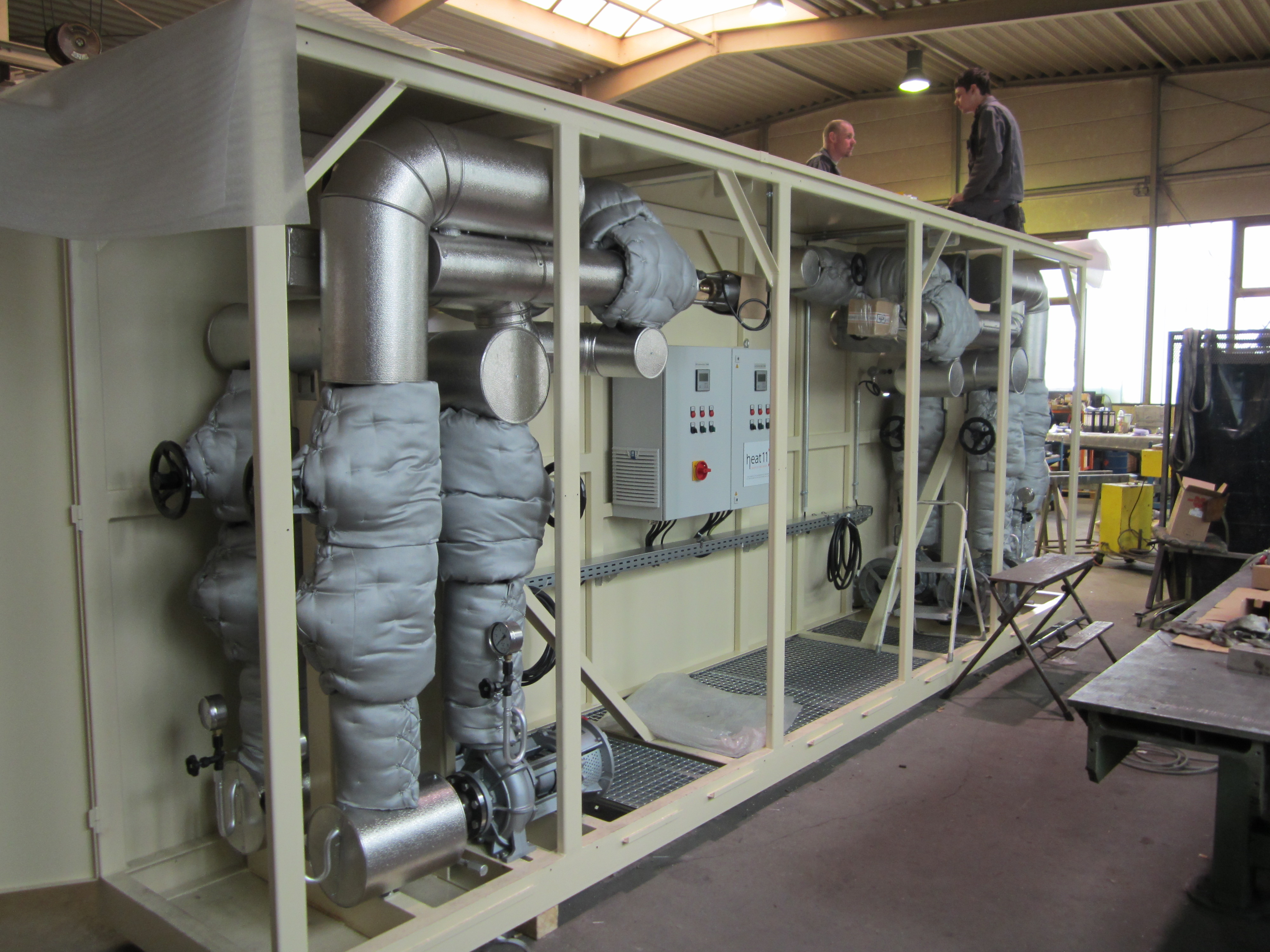 Sekundärkreis zur Temperierung einer Kaschiermaschine